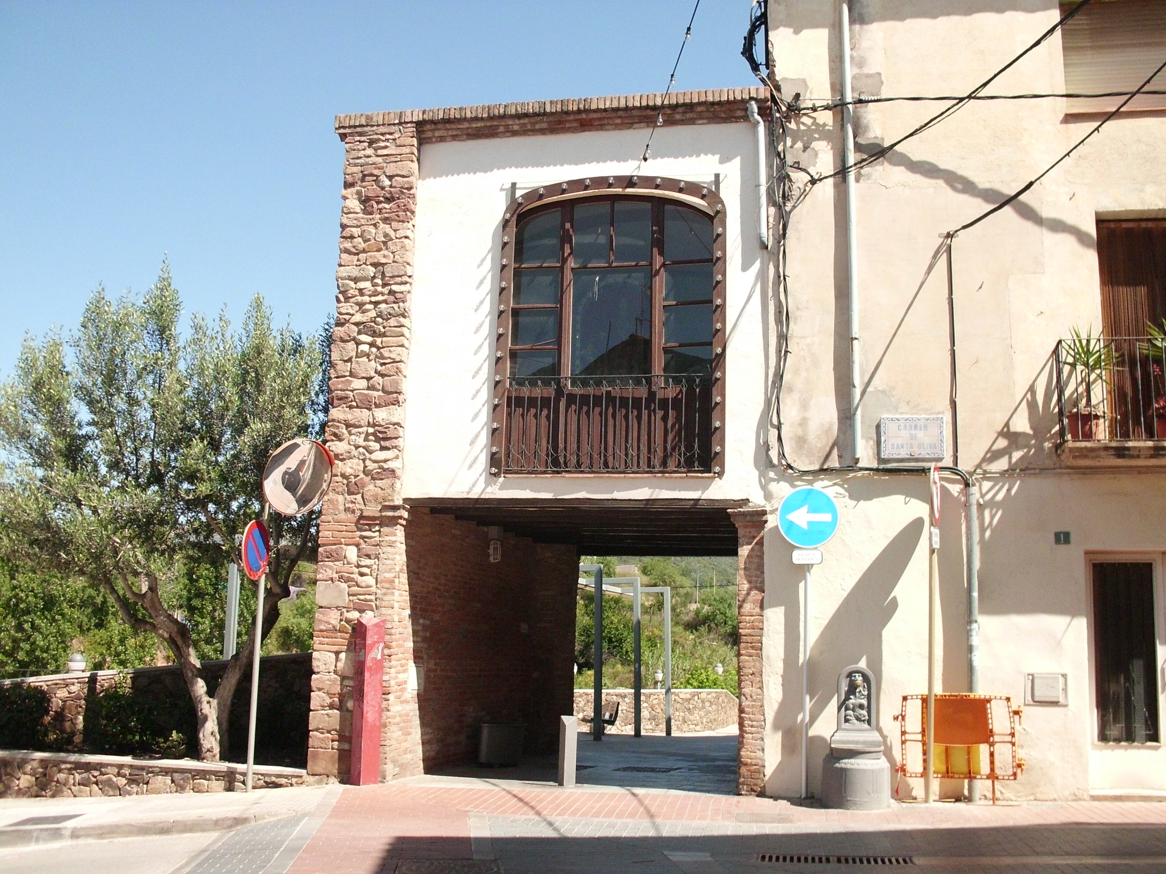 Capella de Santa Oliva (Olesa de Montserrat)